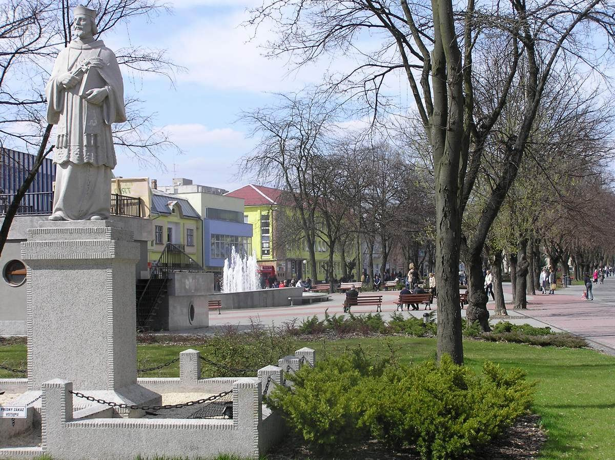 Socha sv. Jána Nepomuckého v parku na pešej zóne mesta.